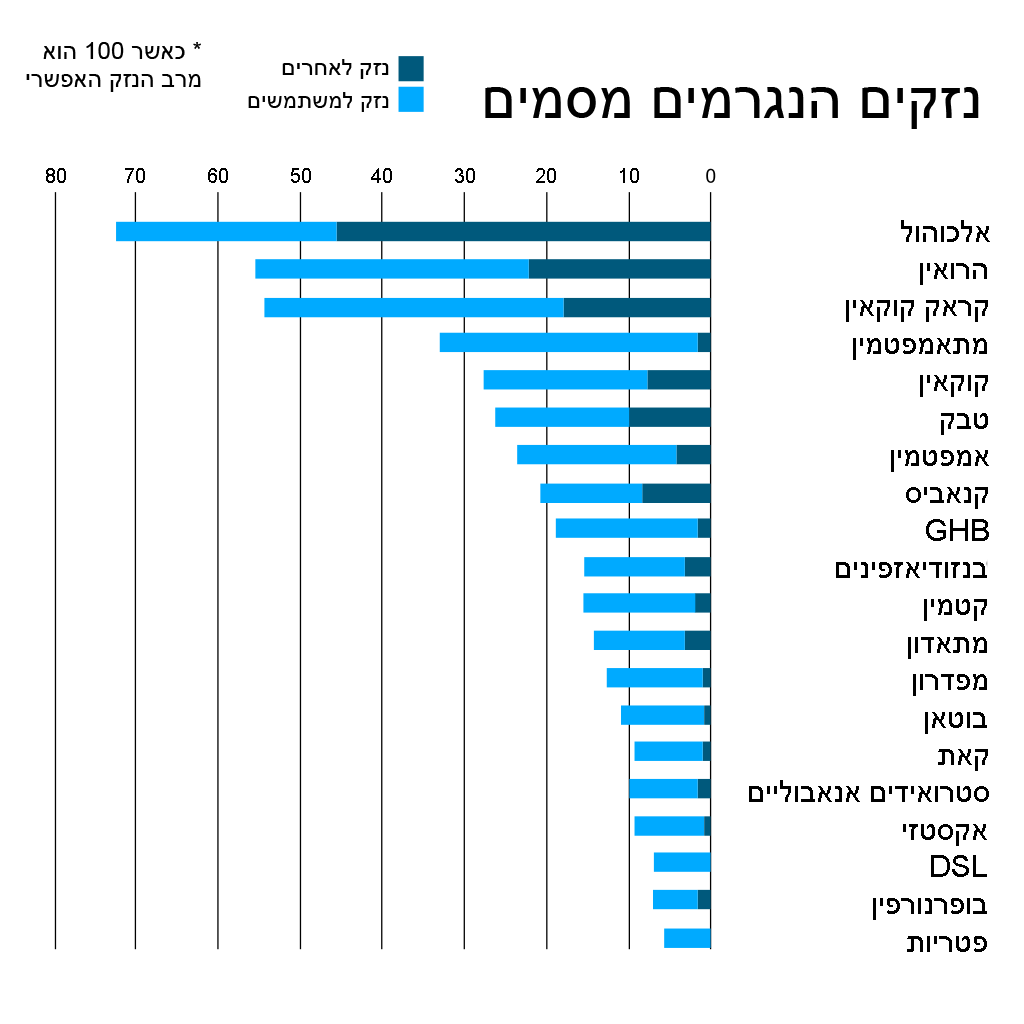 תרגום של זה